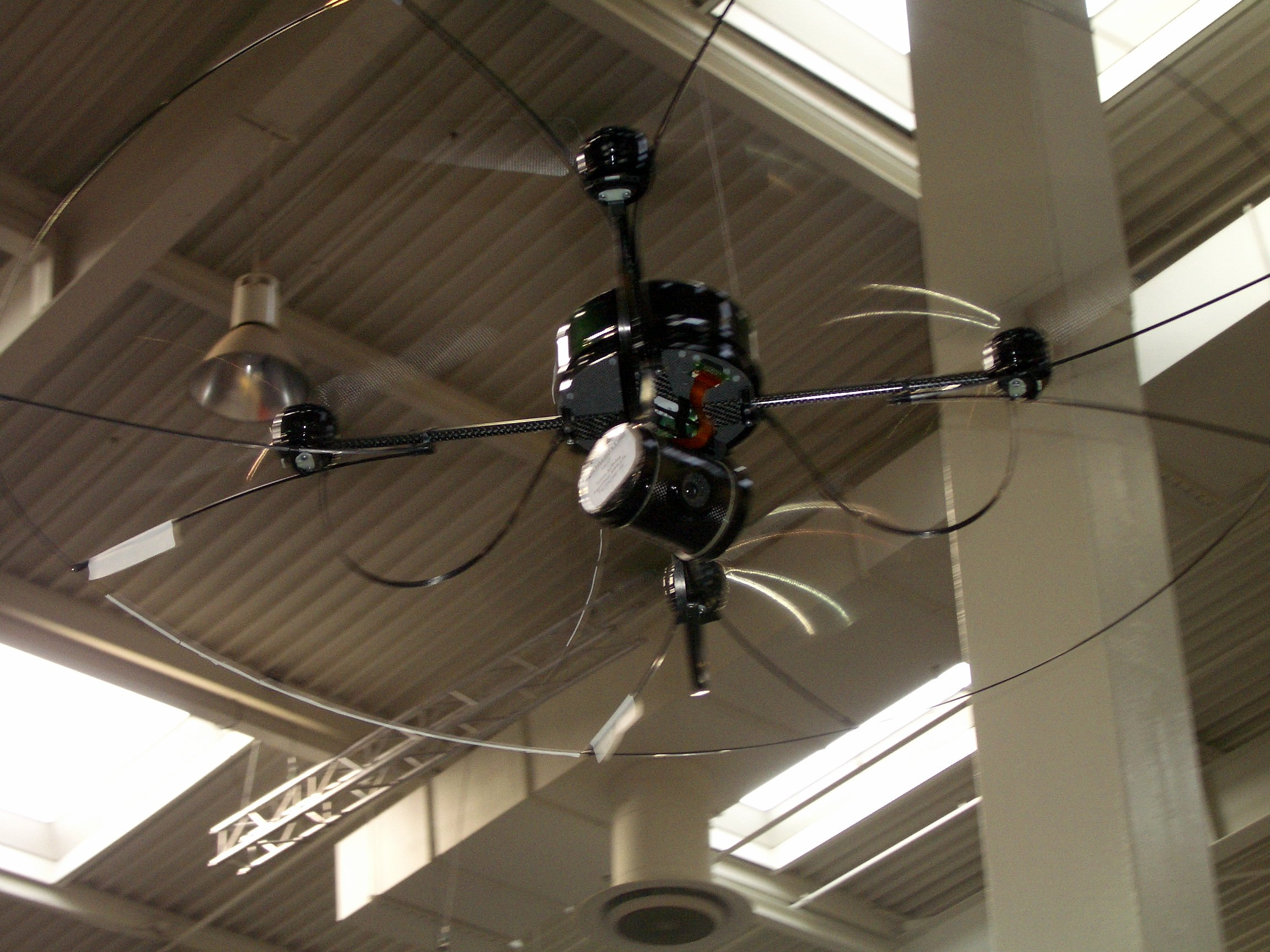 Vorführung der Aufklärungsdrohne Mikado (AirRobot AR-100B) auf dem Stand des Heeres der Bundesrepublik Deutschland in Messehalle 6 der CeBIT 2006. Fotograf: padeluun.